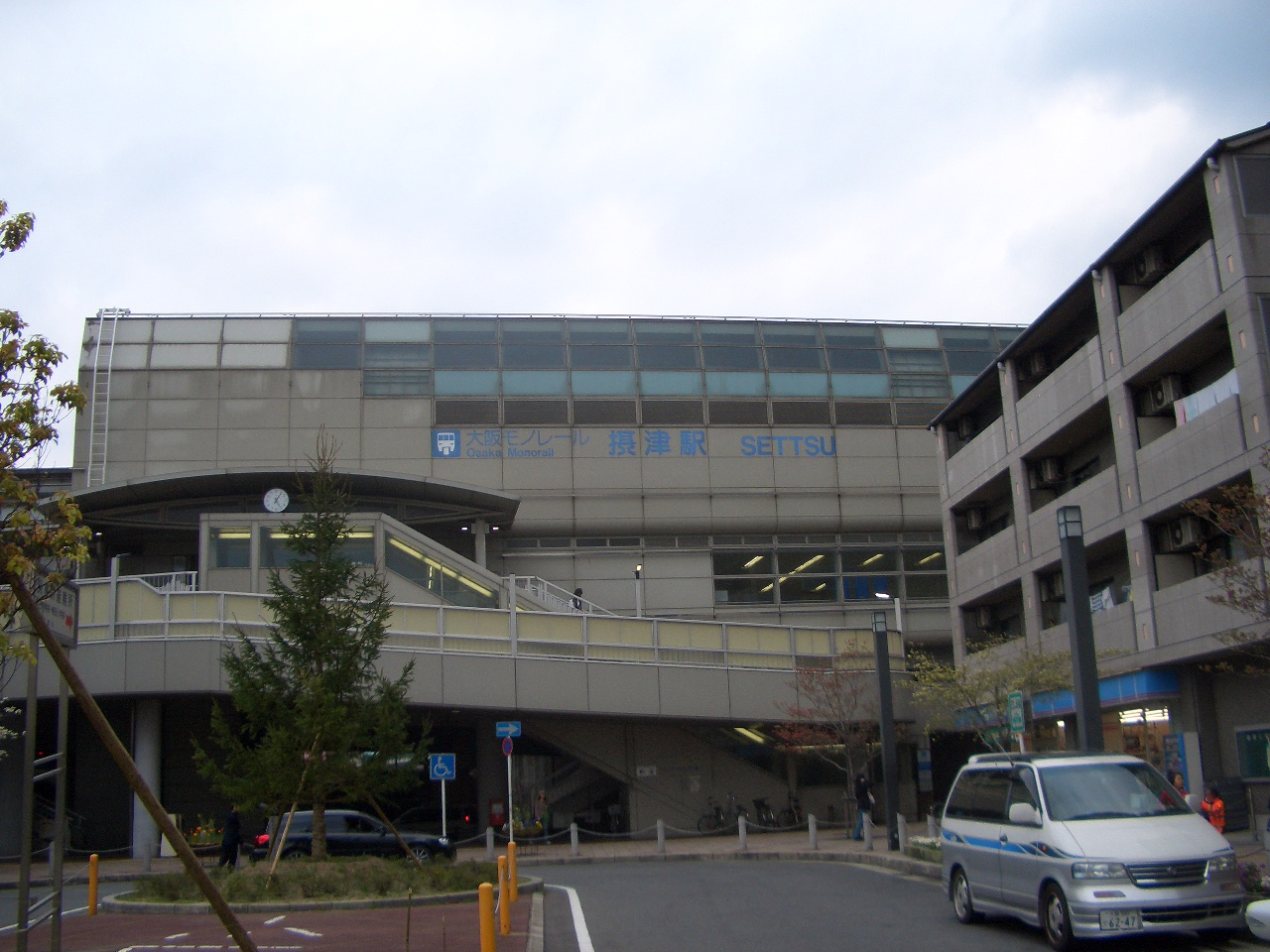 摂津駅。 Settu Station。